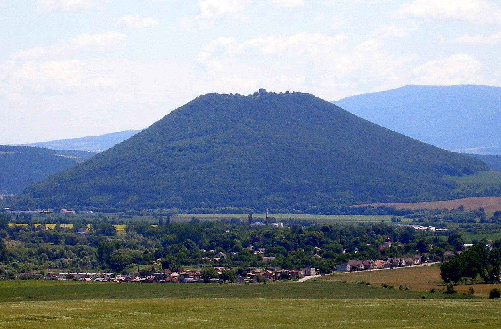 Obec Ostrovany okres Sabinov. V pozadí hradný kopec Šarišského hradu.